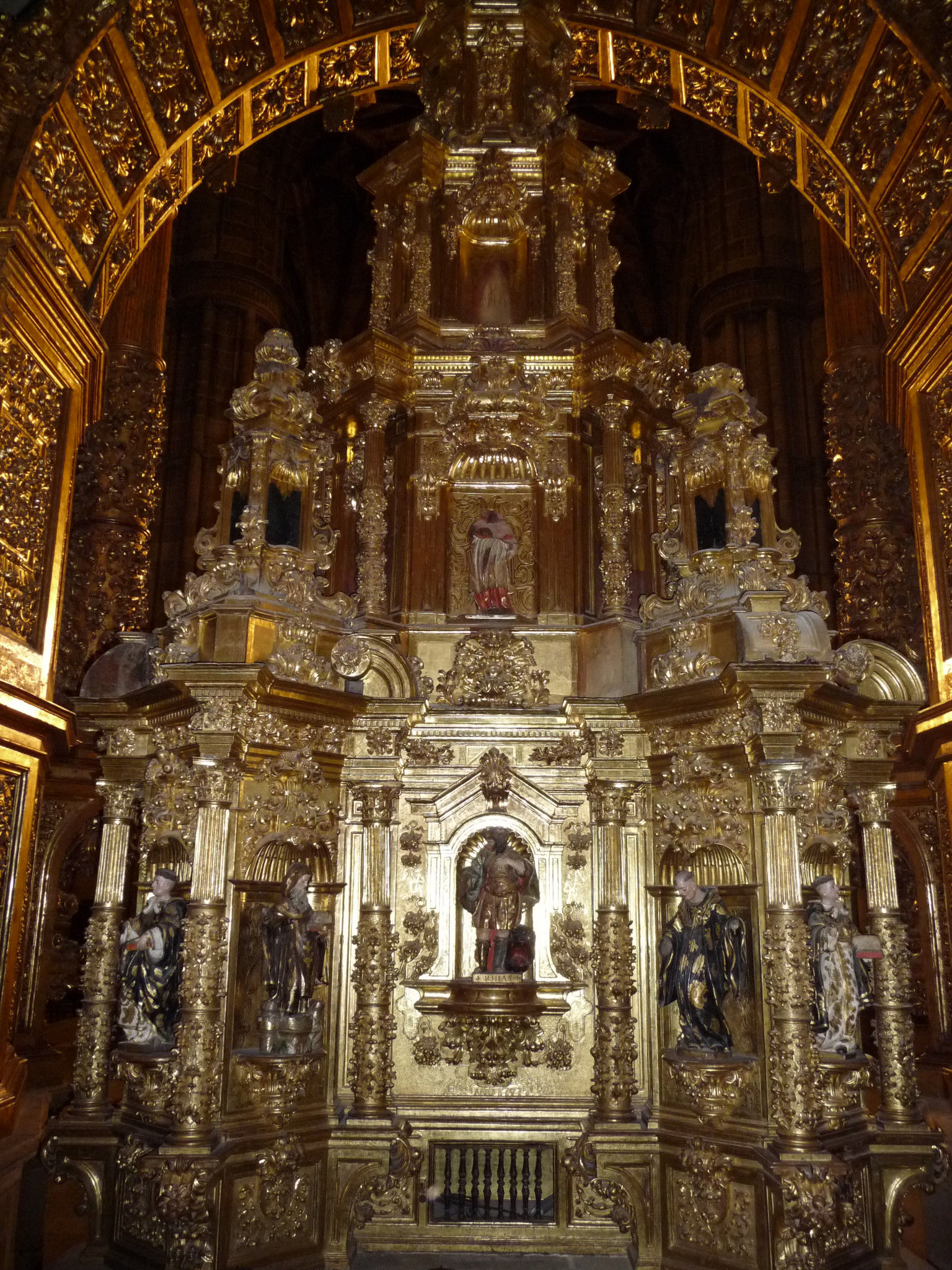 Iglesia de Santo Tomás. Haro, La Rioja (España) - Relicario